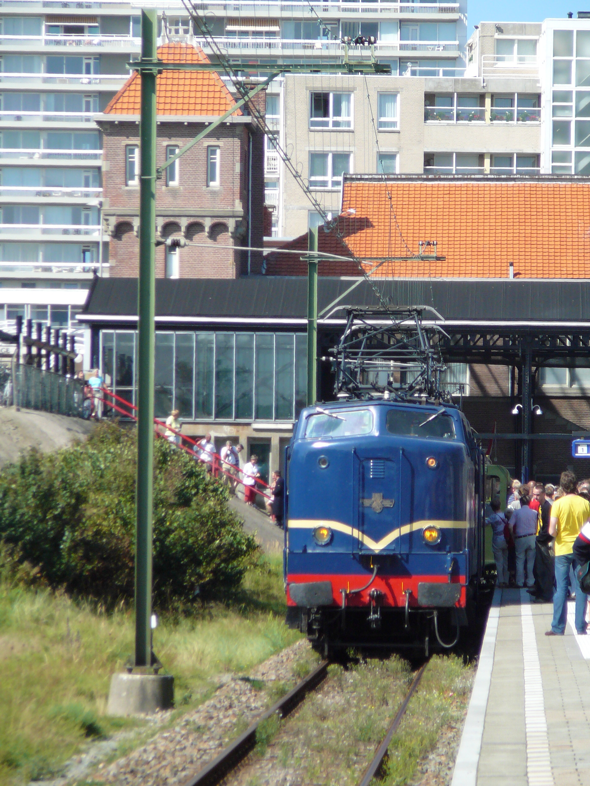 E-lok 1202 met Blokkendoos in Zandvoort